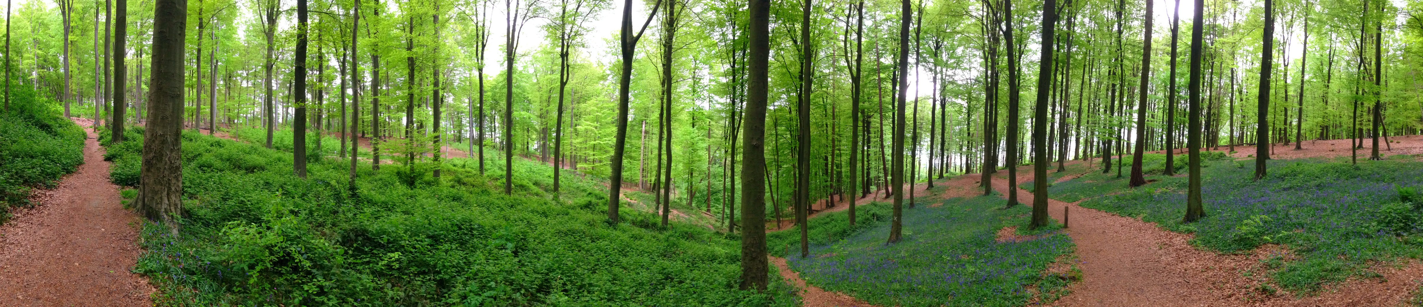 muziekbos met boshyacinthen